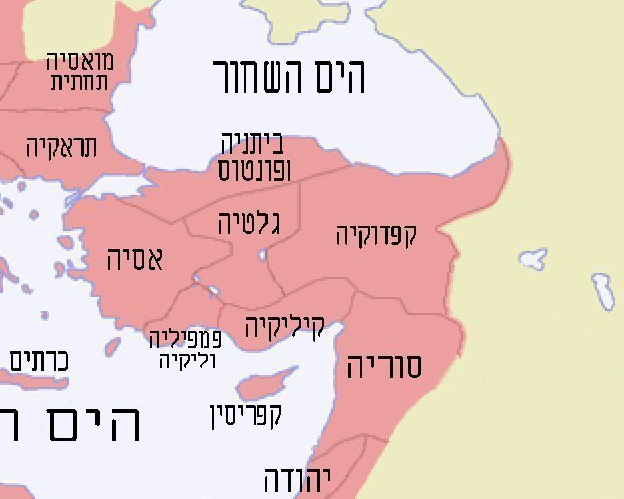 מזרח האימפריה הרומית